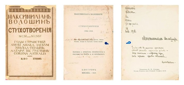 Обложка книги стихотворений Максимилиана Волошина 1910 года работы Александра Арнштама с автографом Волошина 1918 года.